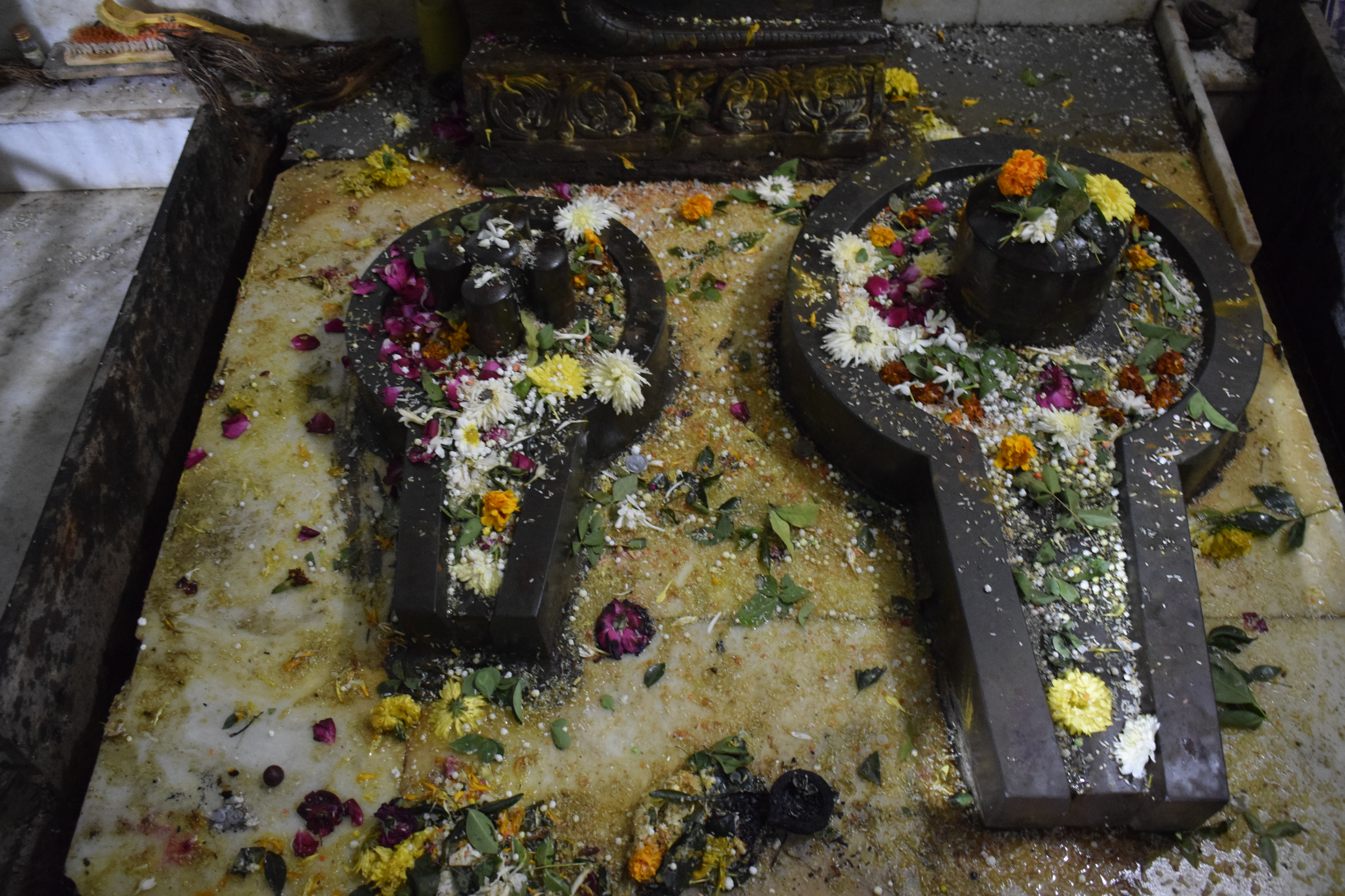 श्री शंकेश्वर लिंग